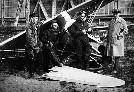 Это фотография сделана в 1930 году в Крыму во время испытаний самолёта СК-4. На фотографии изображены (справа налево): Королёв, Кошиц, Шимраев, Подлесный у обломков разбившегося самолёта СК-4.